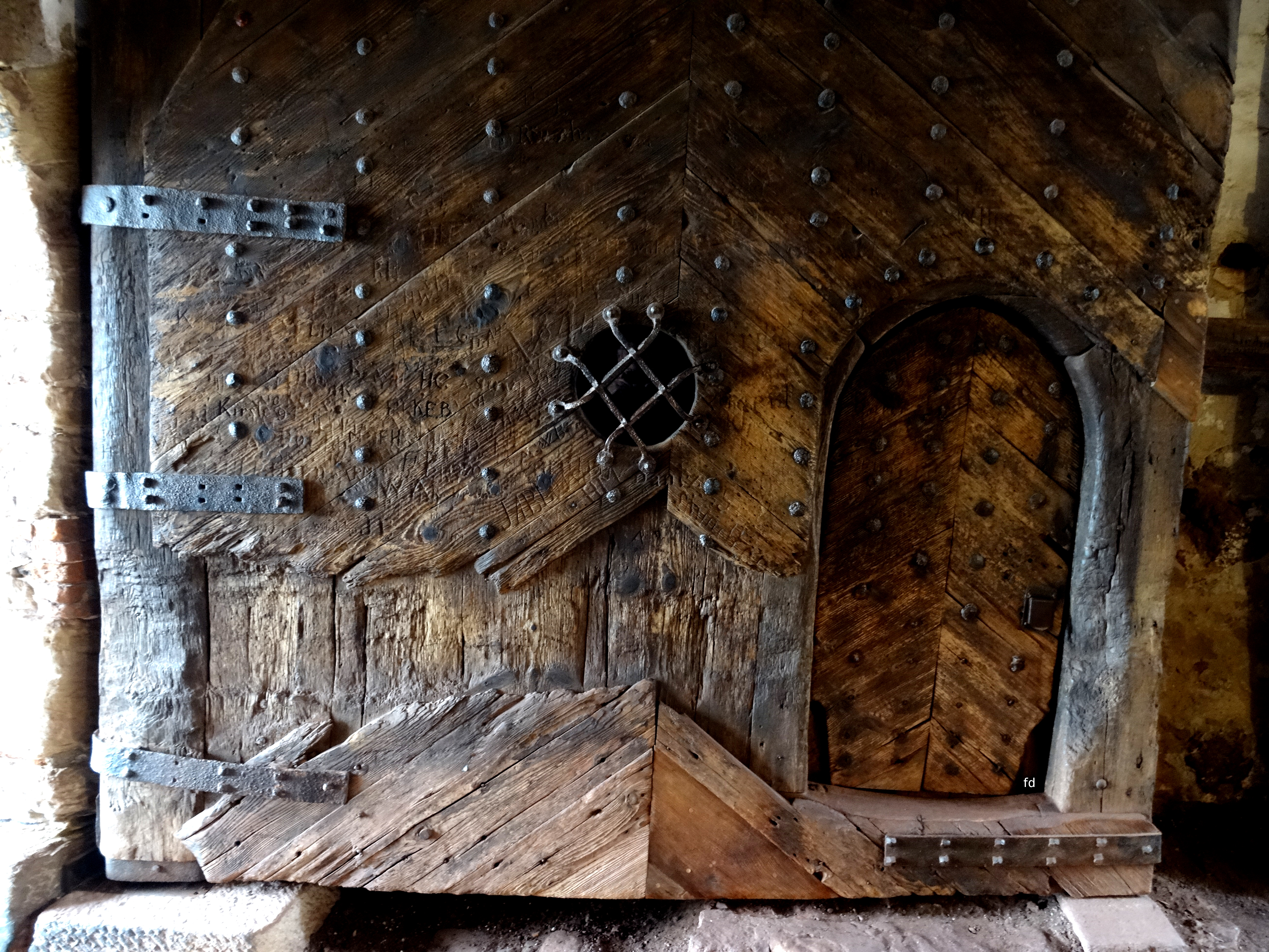 Wartburg Eisenach Eingangstor mit Schlupftür.